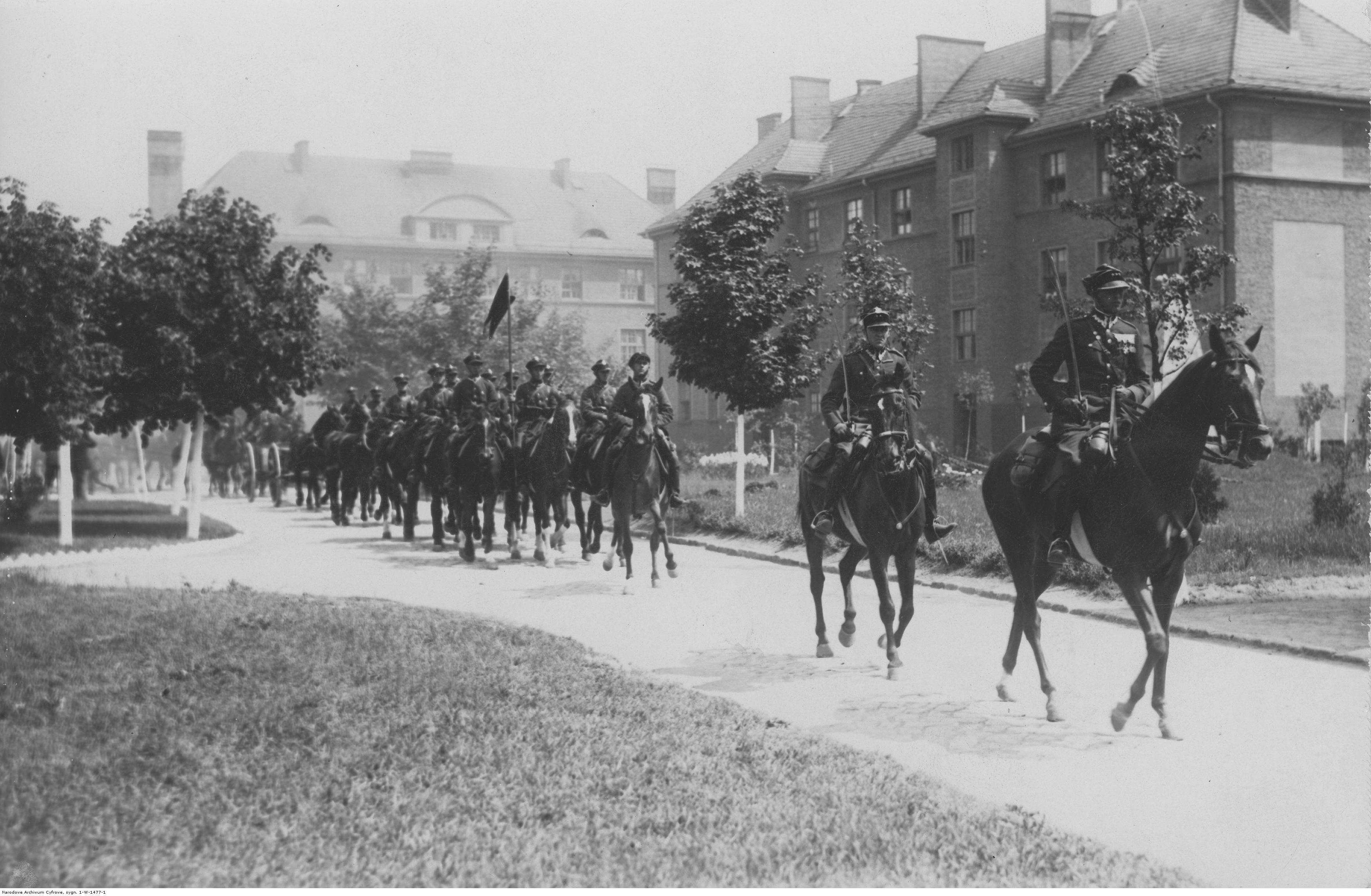 Święto 7 Dywizjonu Artylerii Konnej w Poznaniu, czerwiec 1930. Defilada kawalerzystów. Koncern Ilustrowany Kurier Codzienny - Archiwum Ilustracji. Sygnatura: 1-W-1477-1